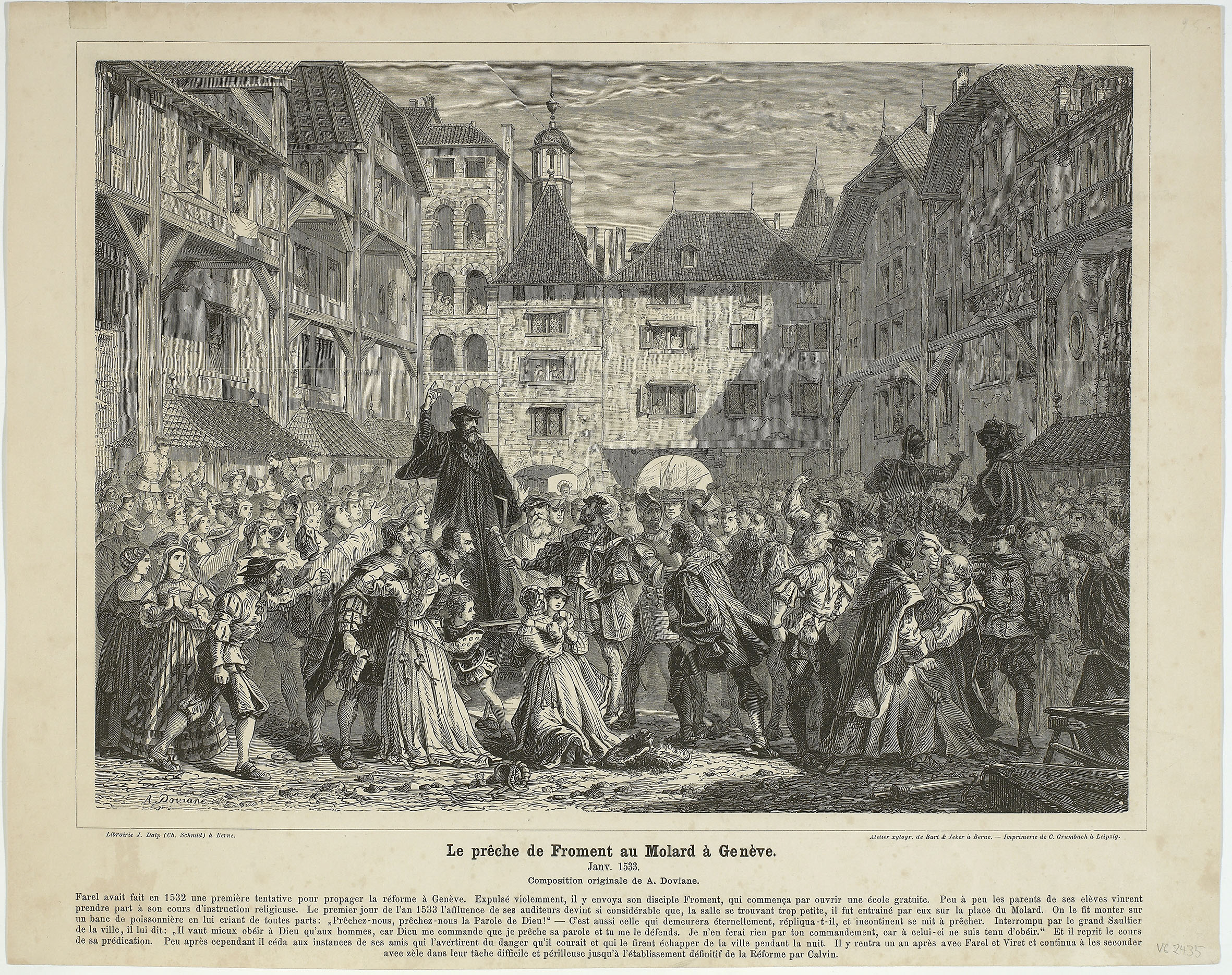 « Le prêche de Froment au Molard à Genève – Janv. 1533 ». Xylographie sur papier, 40.4 cm; haut. 32 cm